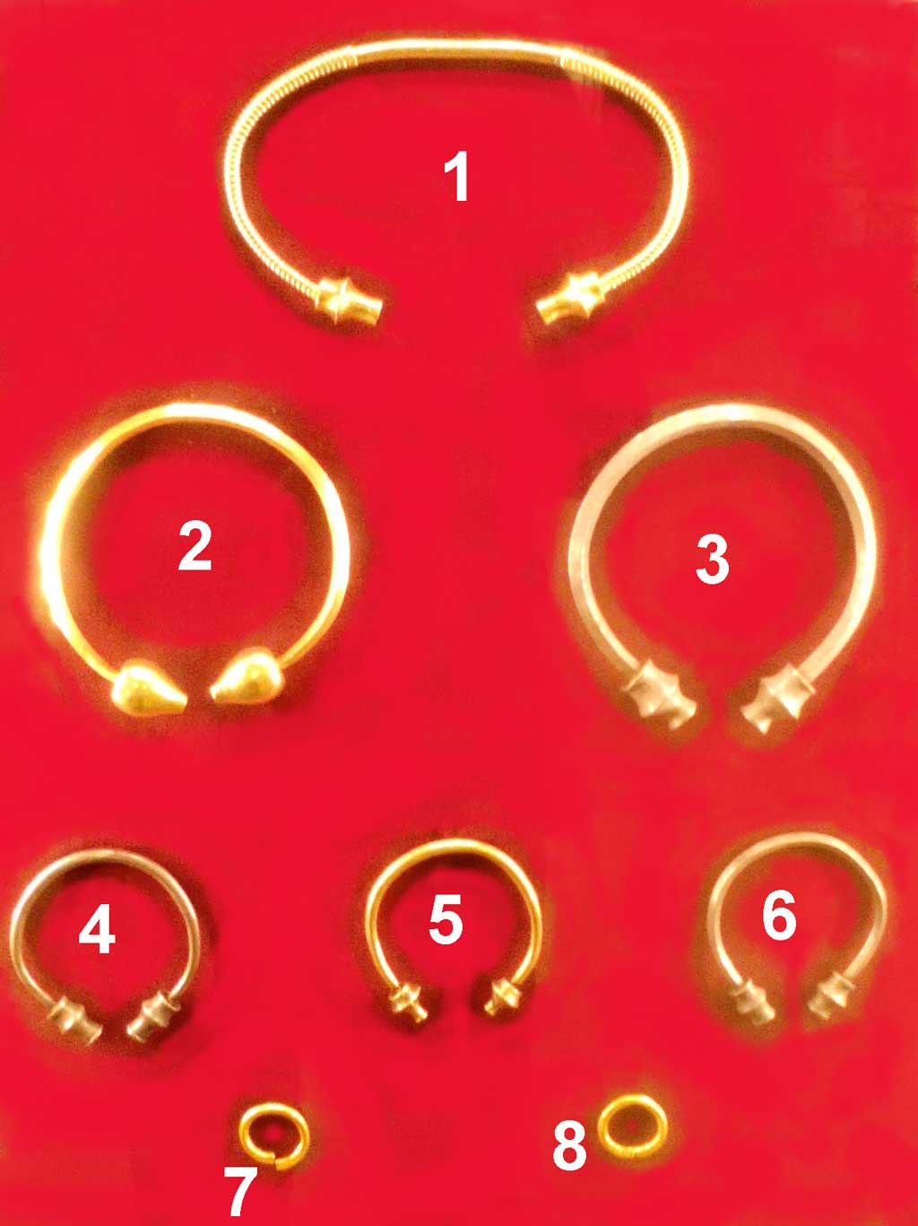 Ourivería Galaica no Museo das Mariñas, colección Rafael Seoane. 1 Torque de ouro, tipo asturnorgalaico. 2 Torque de ouro, tipo nordorientalgalaico. 3 Torque de prata, Sobrado dos Monxes. 4 Brazalete de prata, Sobrado dos Monxes. 5 Brazalete de ouro, Astorga. 6 Brazalete de prata, Sobrado dos Monxes. 7-8 Aros de ouro, castrexos?